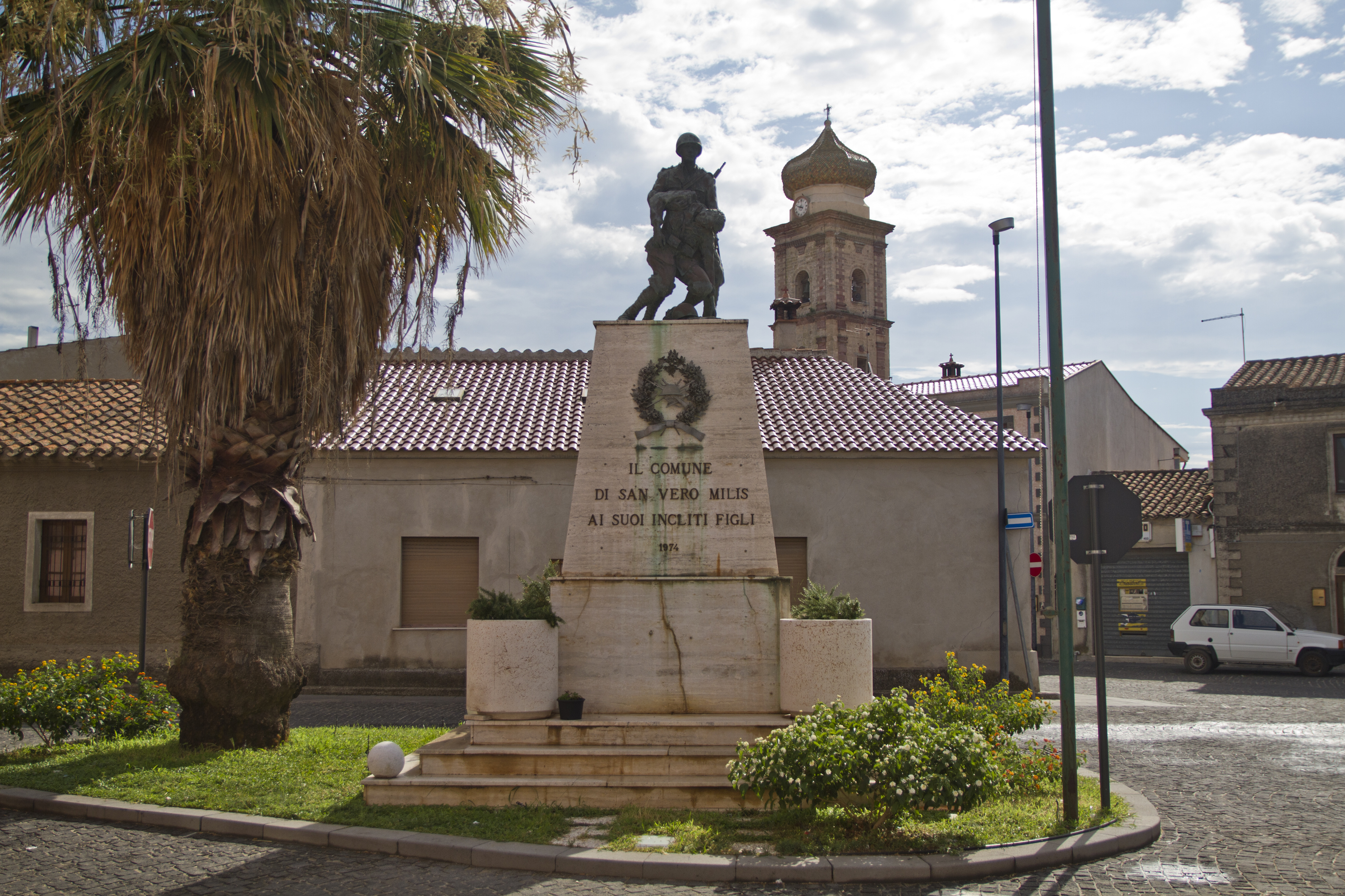 WW2 memorial